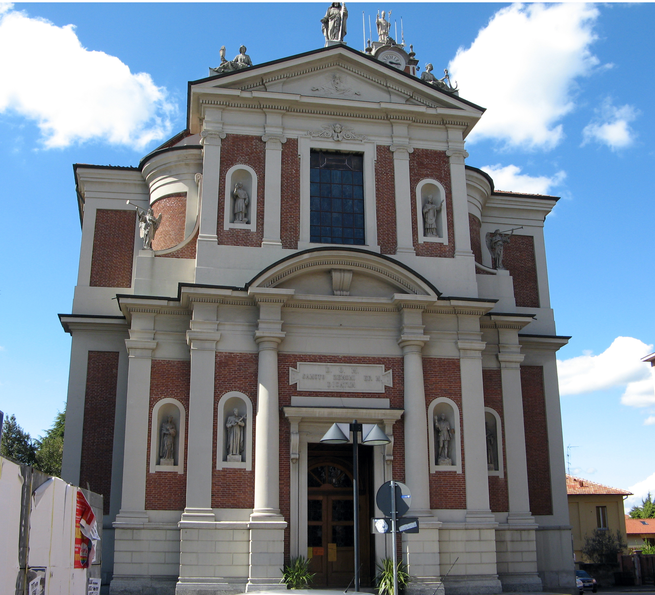 Chiesa di San Zenone in Gallarate (Italy)